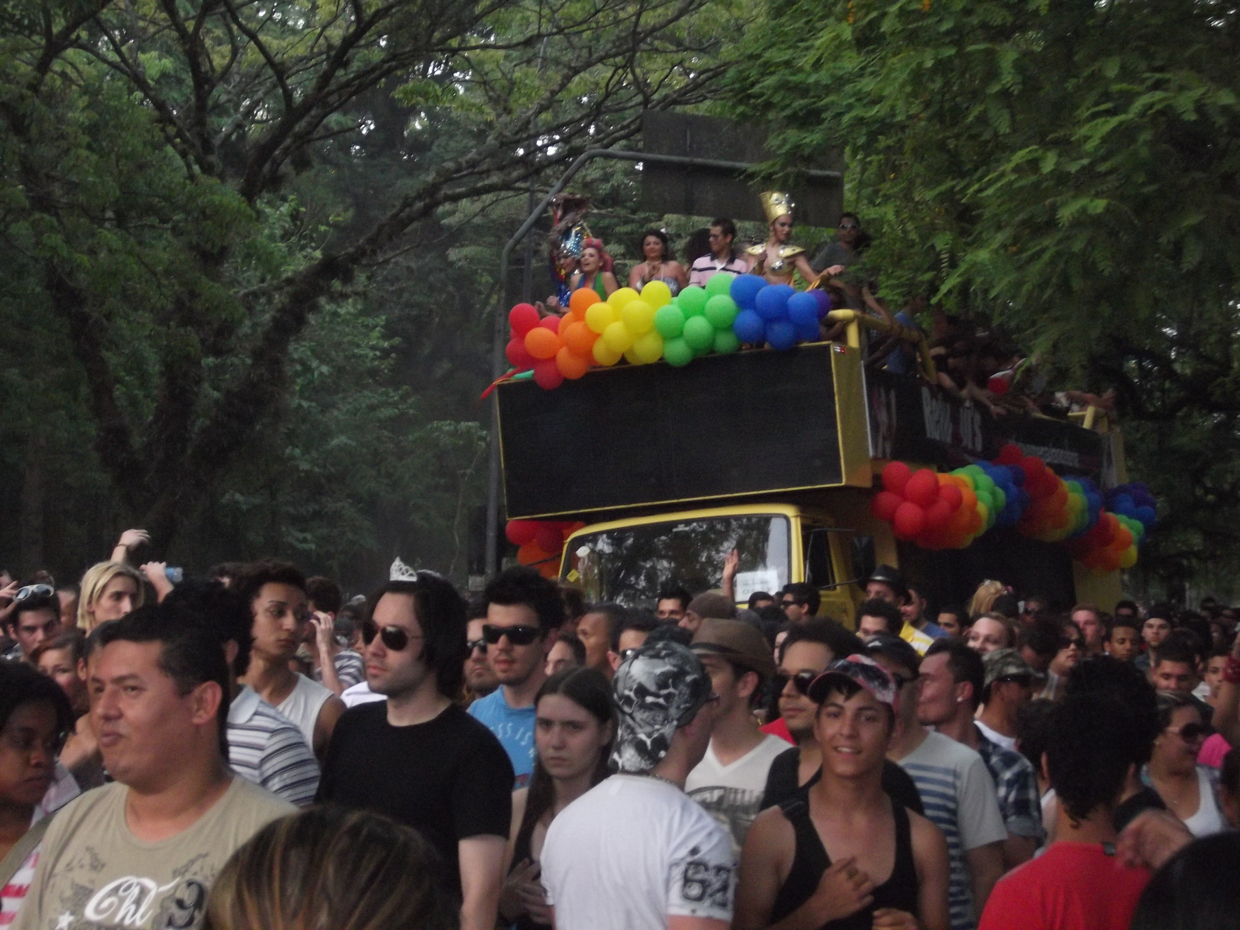 15ª Parada Livre Porto Alegre